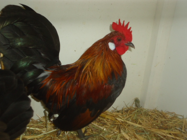 Coq nain